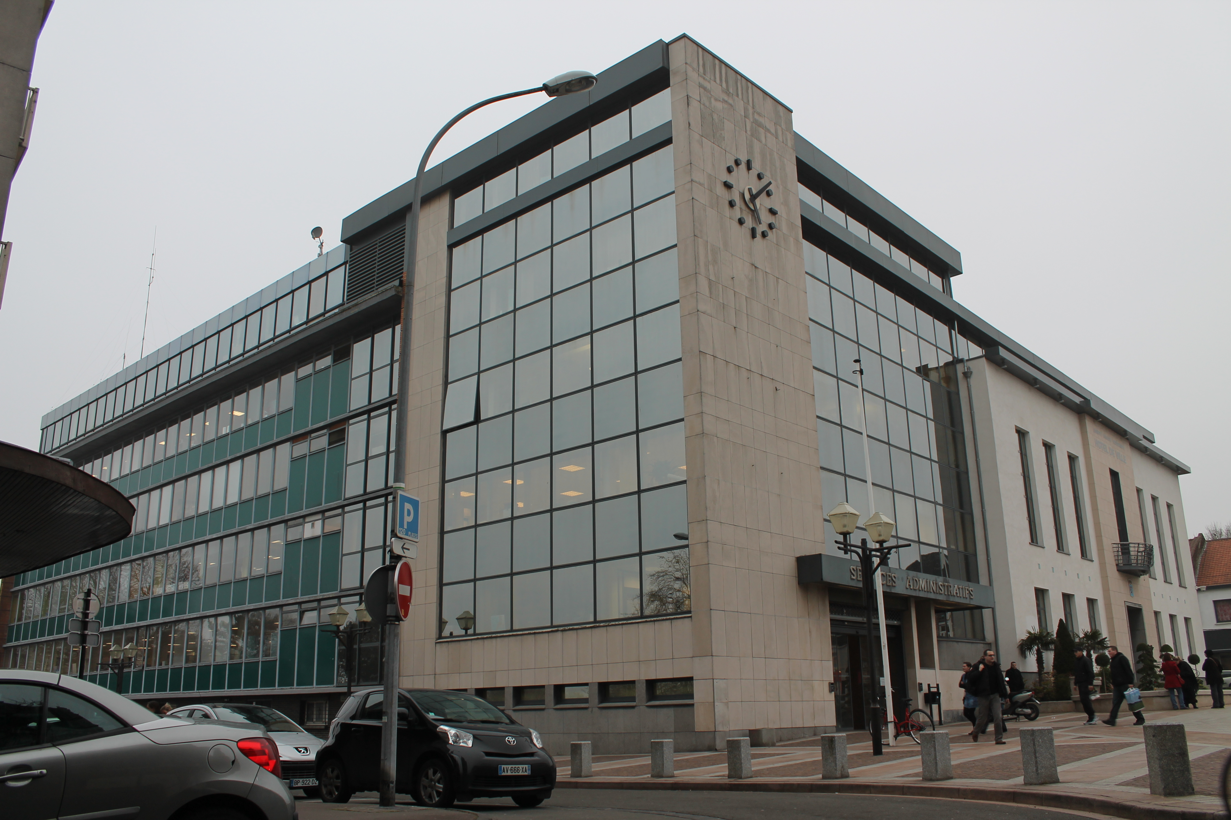 La mairie de Wattrelos, avec ses services administratifs.